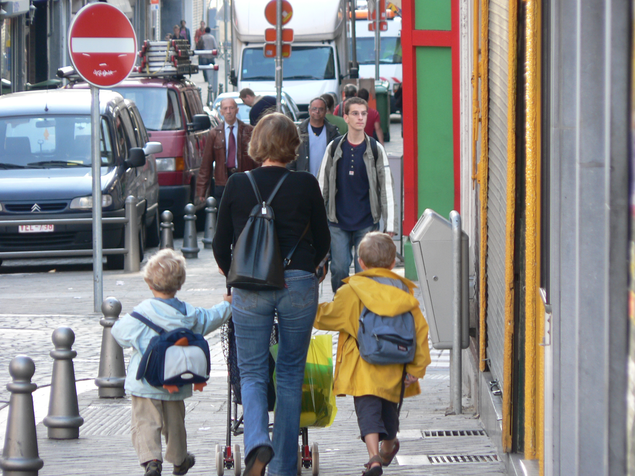 Le haut de la rue Saint-Gilles, au croisement de la rue Louvrex à Liège.